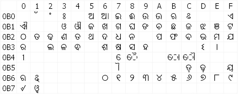 Oriya font. Eigen werk. PD.